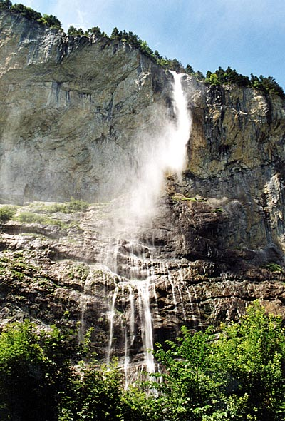 Staubbachfall